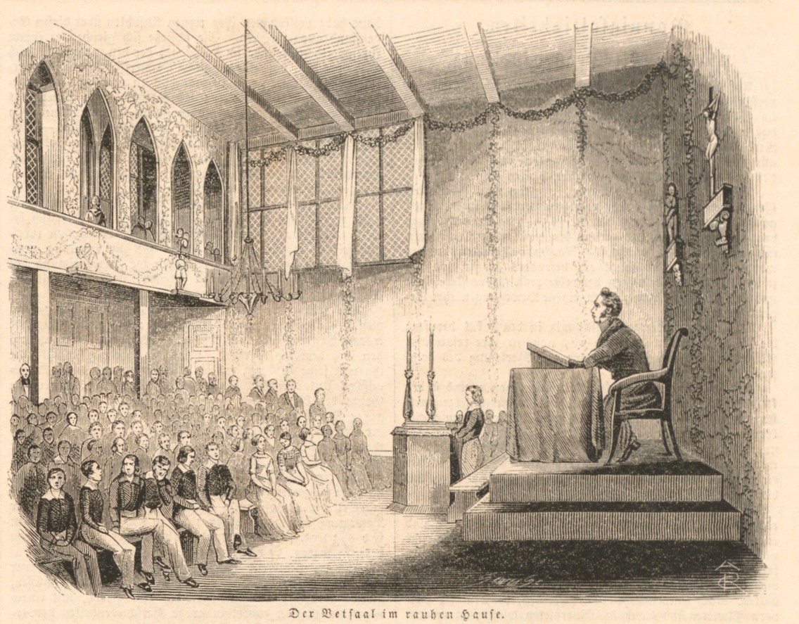 Betsaal des Rauhen Hauses (ca. 1845) Lizenzstatus: Public Domain; aus: Illustrirte Zeitung, 7/1846, S. 237